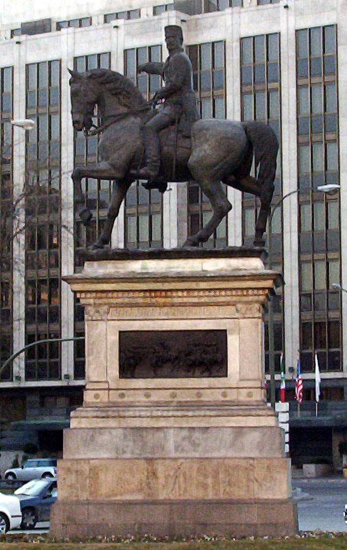 Monument to Manuel Gutiérrez de la Concha